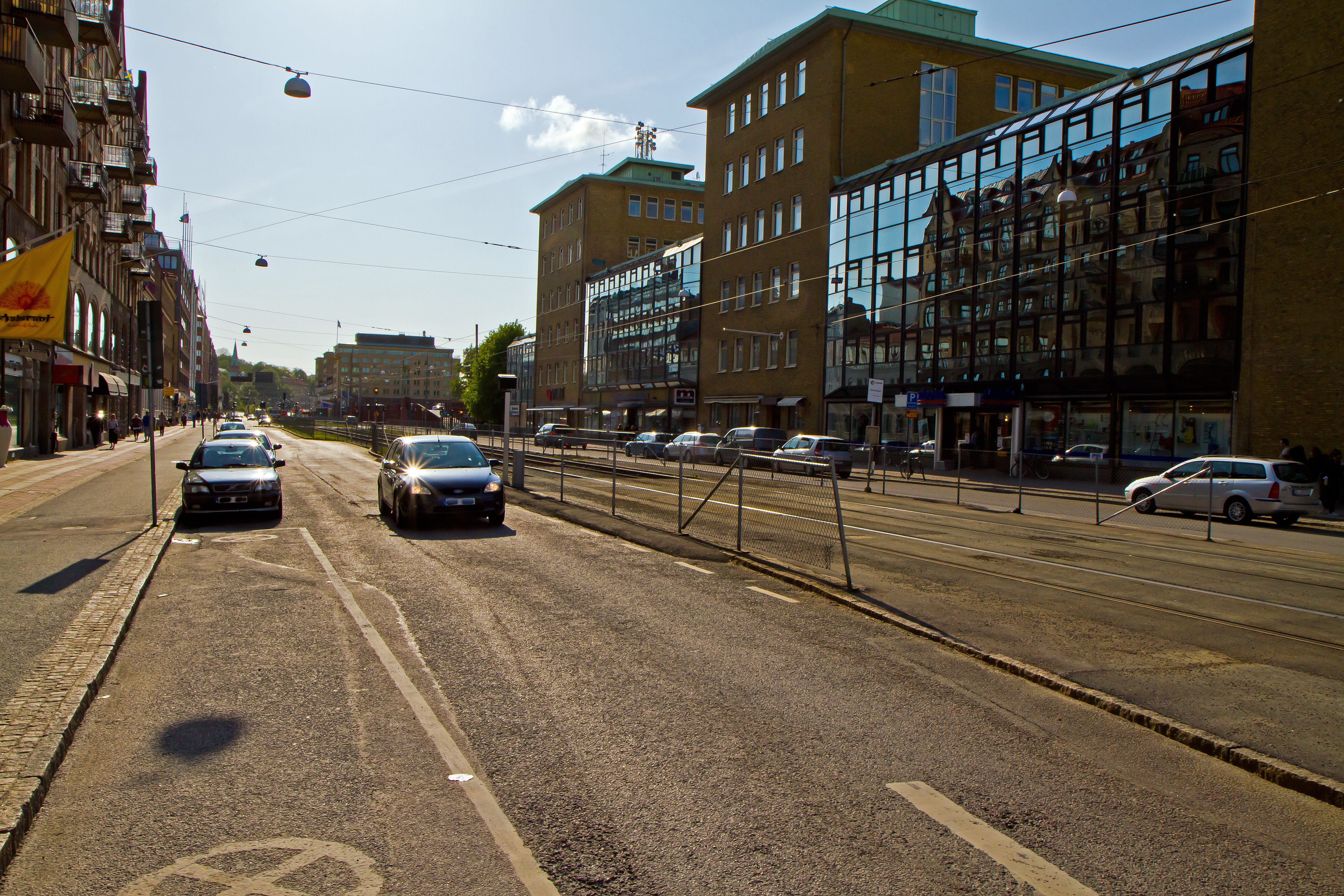 Första LÅnggatan, Maj 2011